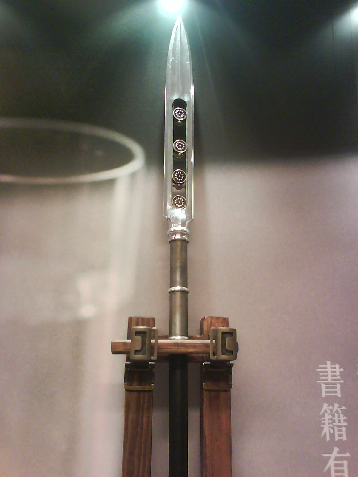 《三國》之矛